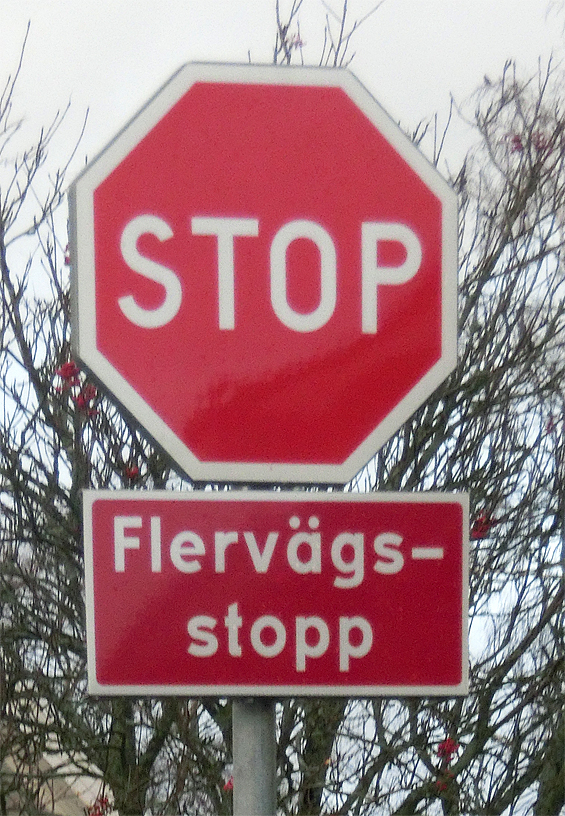 Röd, åttakantig stoppskylt med tillägget "Flervägsstopp" i korsningen Hoffmansgatan-Köpmansgatan i Hillerstorp, Gnosjö kommun, Jönköpings län, Sverige.